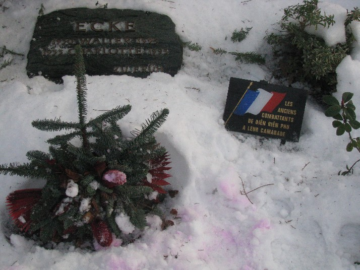 Letzter Gruß ehemaliger Mitkämpfer in Dien Bien Phu an einen verstorbenen Kameraden